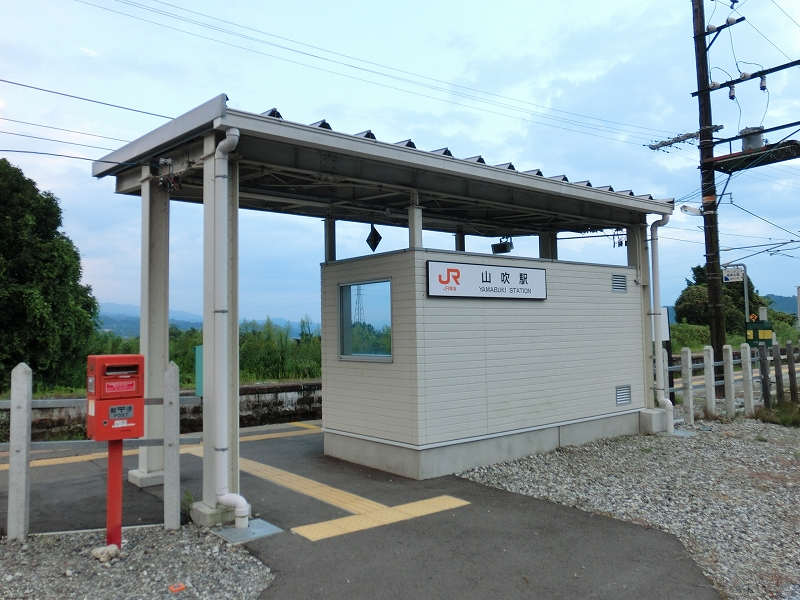 Yamabuki Station (2008~)